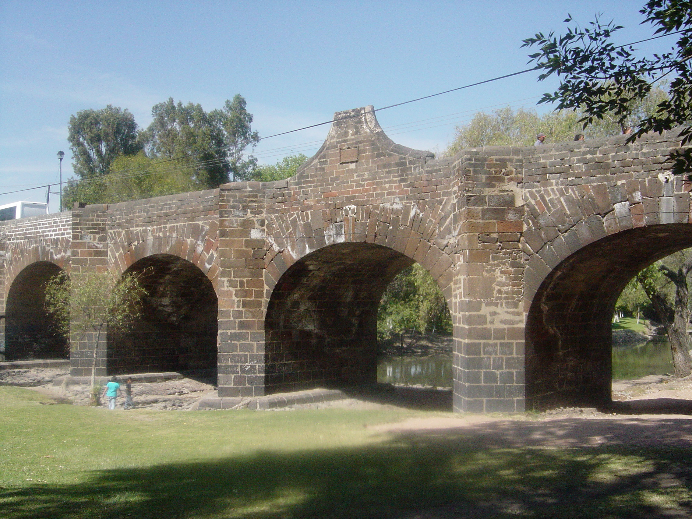 Puente de la Historia (Patrimonia cultural)situado sobre la Av. Juares y el rio San juan, con una antigüedad de mas de 300 años, es uno de los destinos turisticos mas importantes de la ciudad, con una gran leyenda que lo caracteriza.